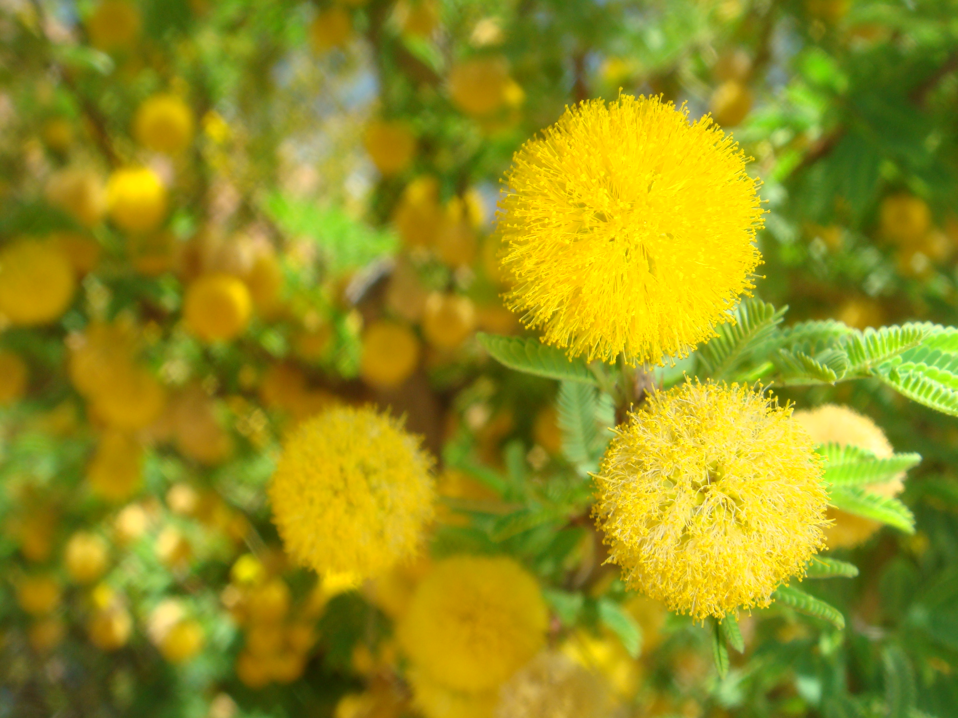 Acacia schaffneri, cultivated, Arizona State University, Tempe, Arizona